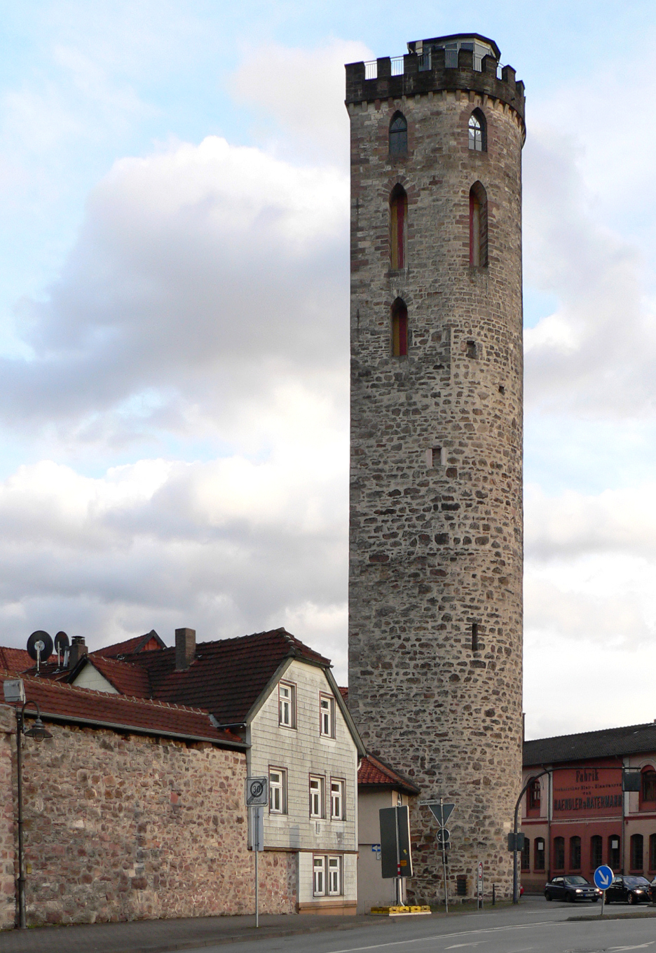 Fährenpfortenturm mit Stadtmauerrest